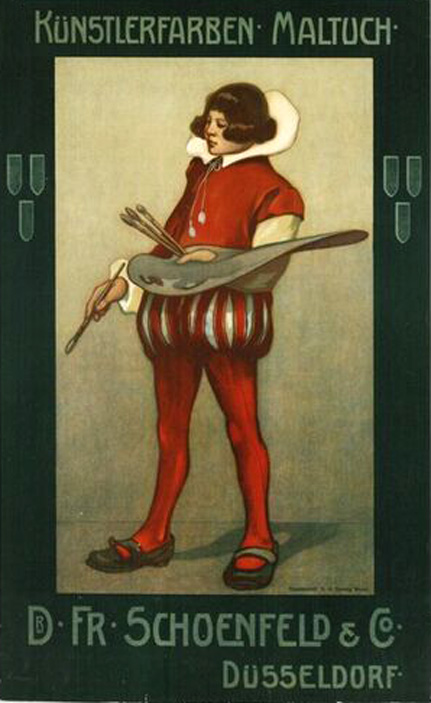 Künstlerfarben Maltuch, Dr. Fr. Schoenfeld & Co. Düsseldorf, Druckgraphik (Farblithografie, Blatt: 810 mm x 505 mm) veröffentlicht um 1900; aus Plakatsammlung Inventar-Nr. DG2003/2614